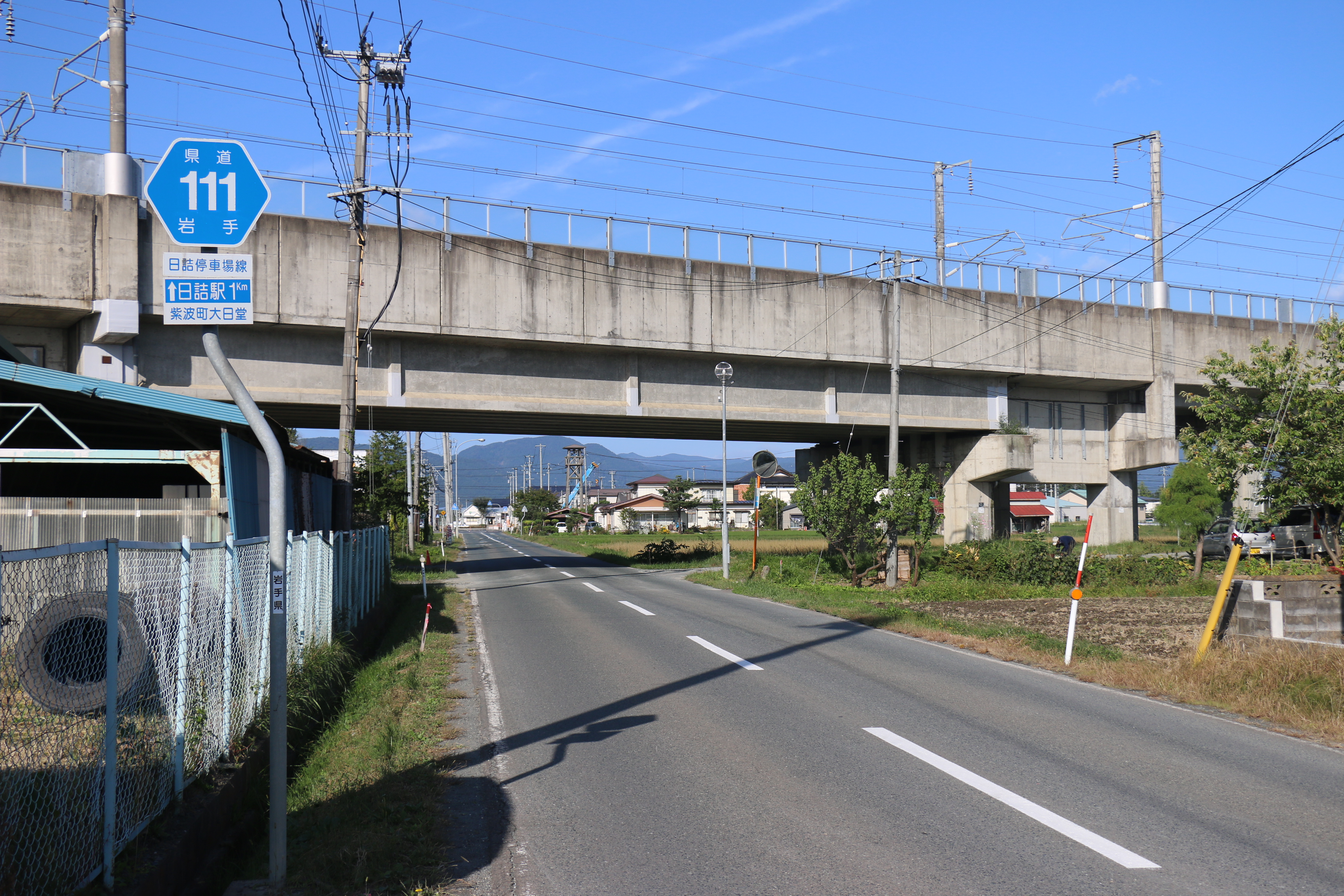 岩手県道111号線 終点付近